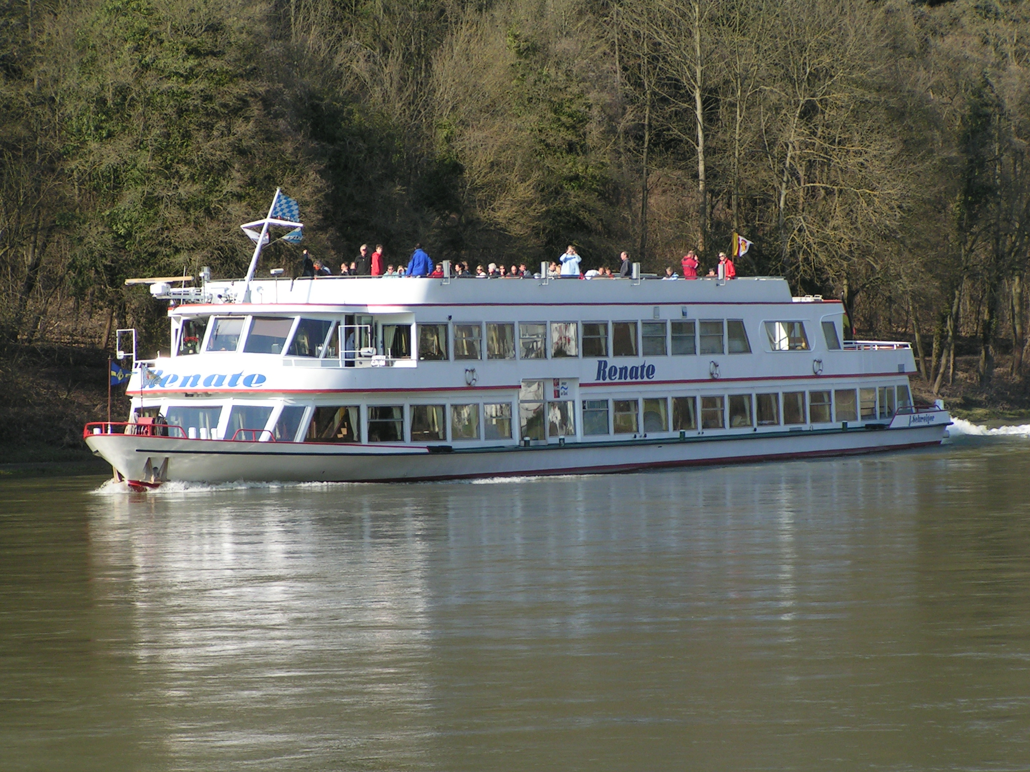 Personenschiff Renate der Fa. Josef Schweiger, Kelheim Technische Daten: Länge: 48,00 m Breite: 9,00 m Gewicht: 240 Tonnen Antrieb: 2 x 510 PS Caterpillar Diesel .